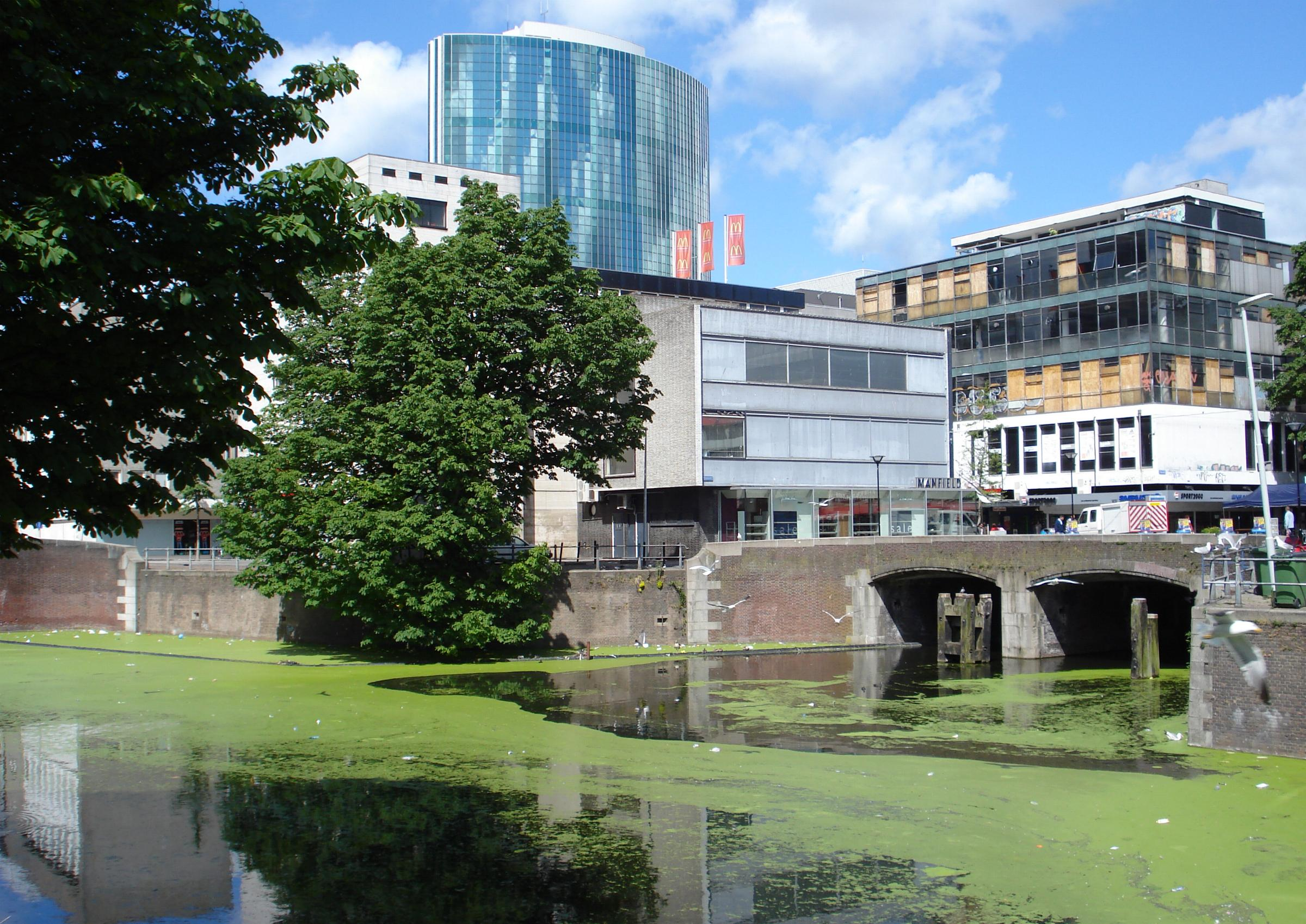 Rotterdam centrum, Steiger en uitwatering Rotte. Historische plaats in Rotterdam.